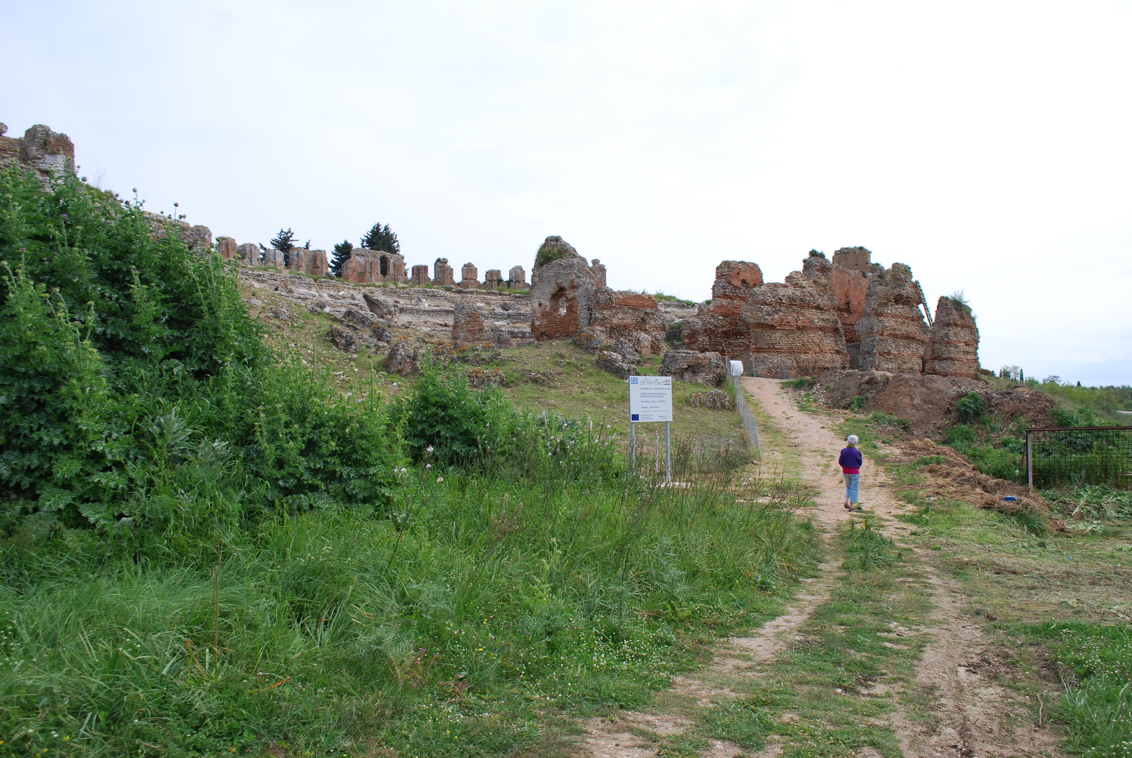 Vue de Nicopolis en Epire.